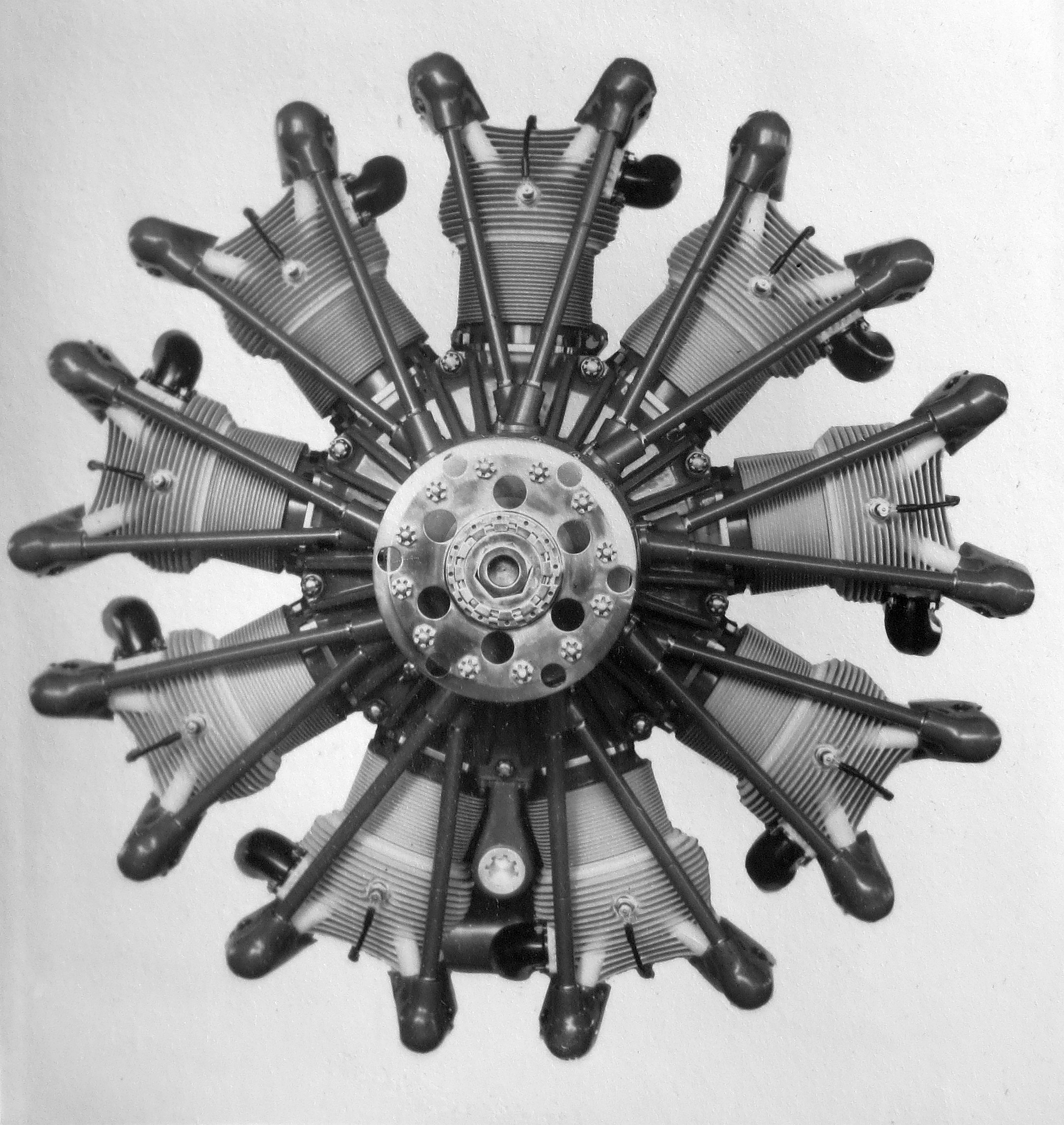 Walter Atlas (1929), radial engine